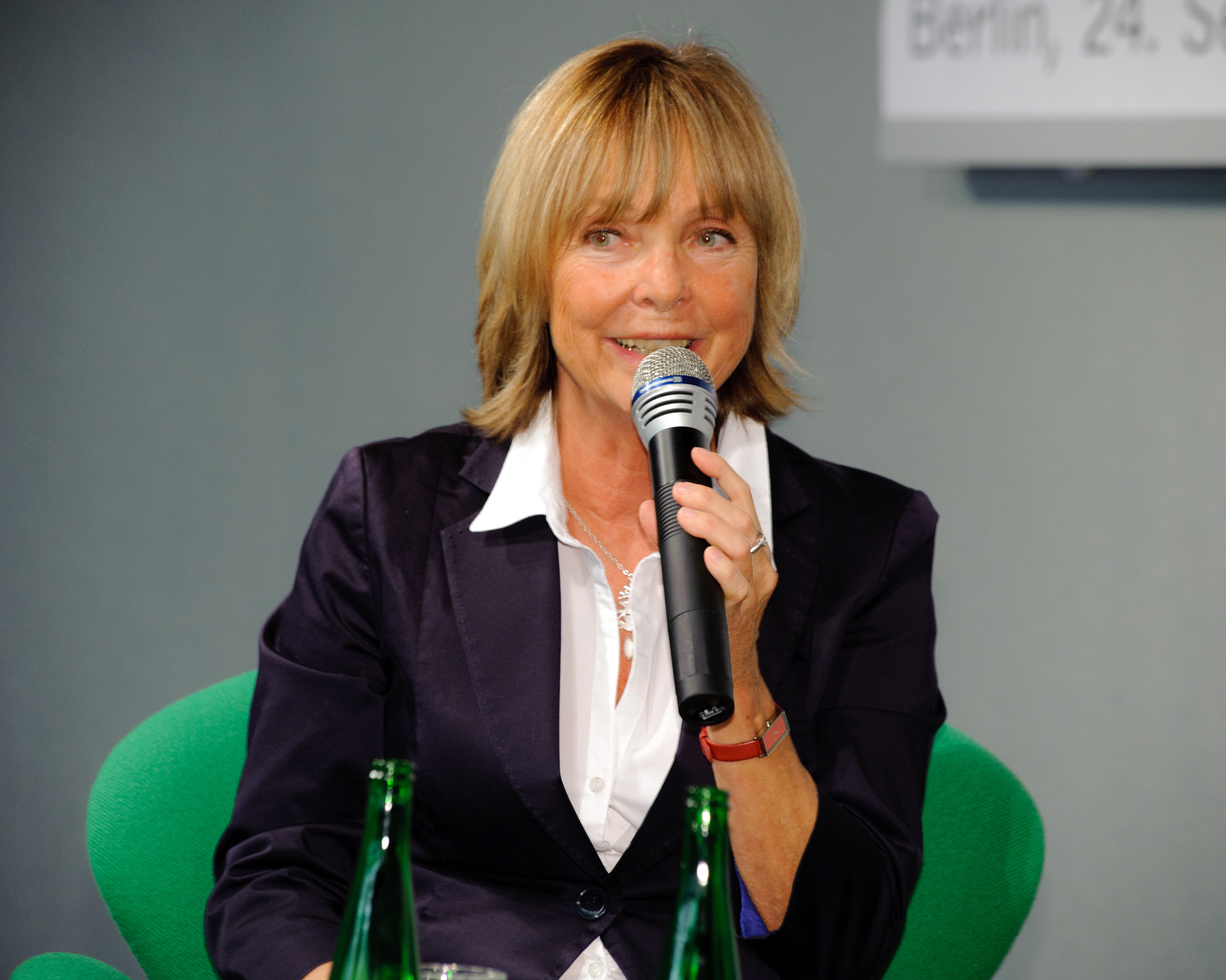 Konferenz: Vom multikulturellen Klassenzimmer zum multikulturellen Lehrerzimmer Potentiale und Grenzen interkultureller Schulentwicklung Foto: Stephan Röhl